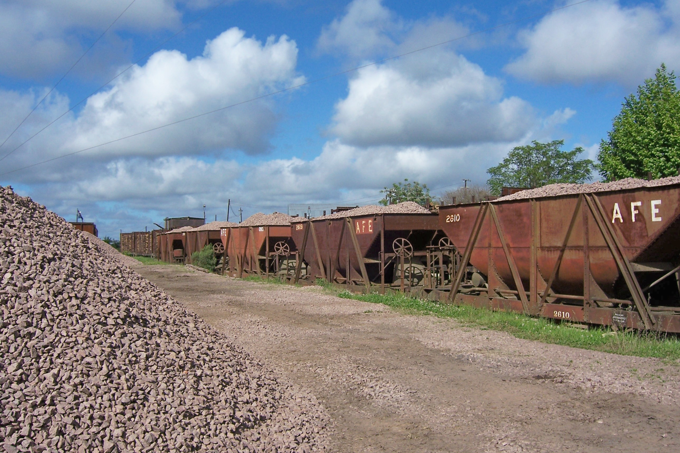 Balasto cargado sobre tolvas para su transporte, Estación Tacuarembó, Uruguay.